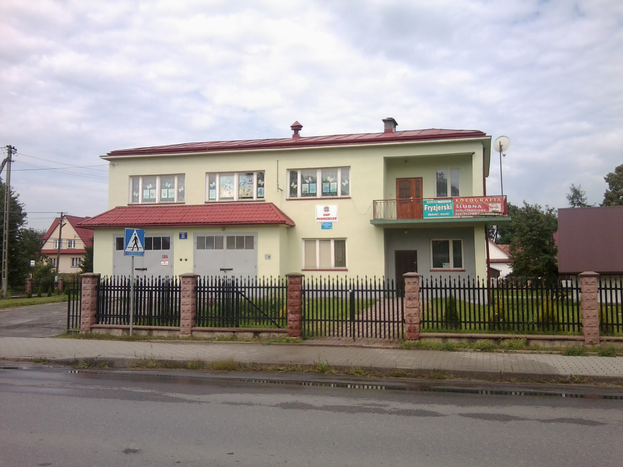 Remiza OSP Podrzecze (województwo małopolskie)